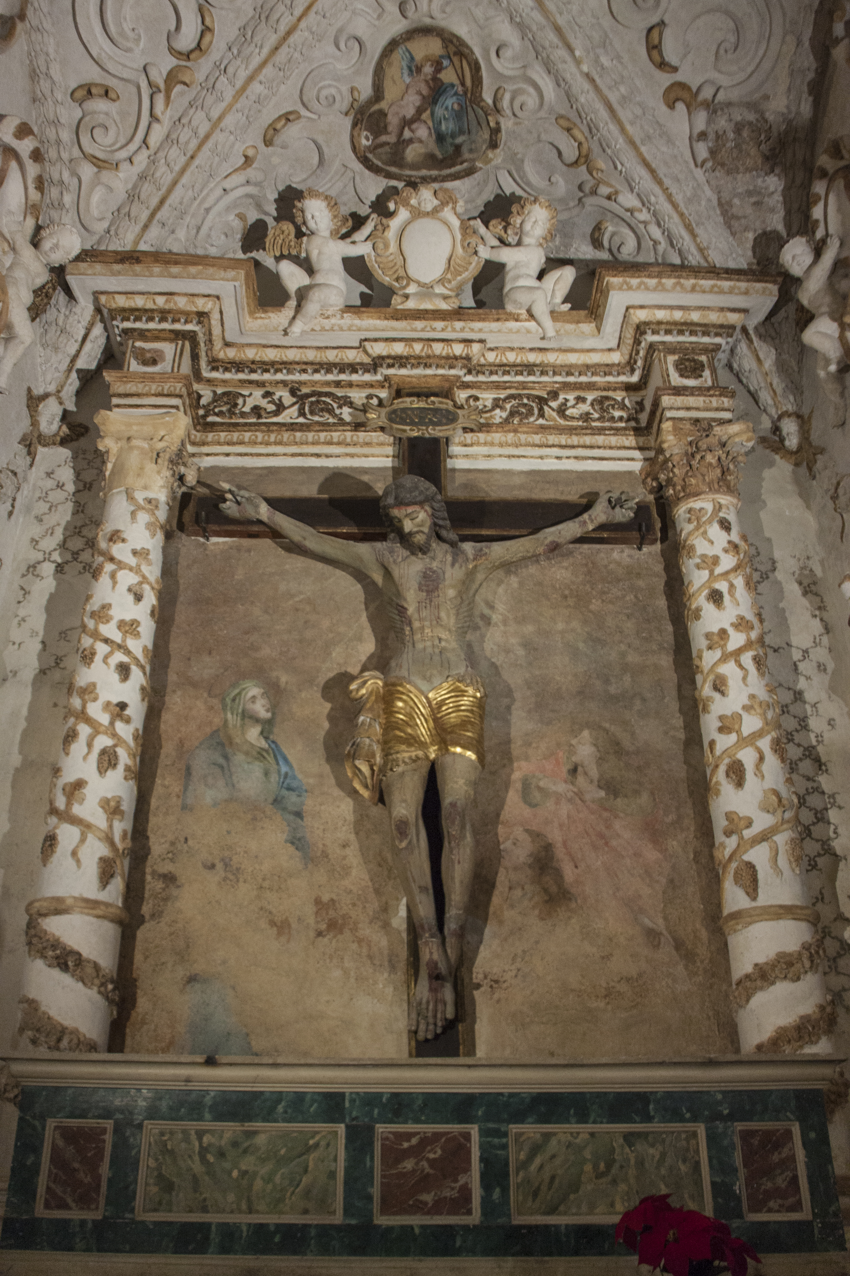 fine del XVI secolo scultura in cartapesta su croce lignea presso Cappella Lombardo